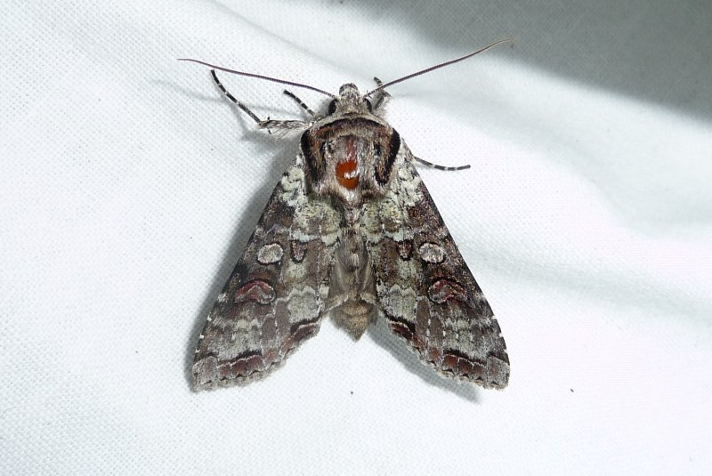 Polia hepatica. Location: The Netherlands - Bargerveen - Schoonerbeekerveld